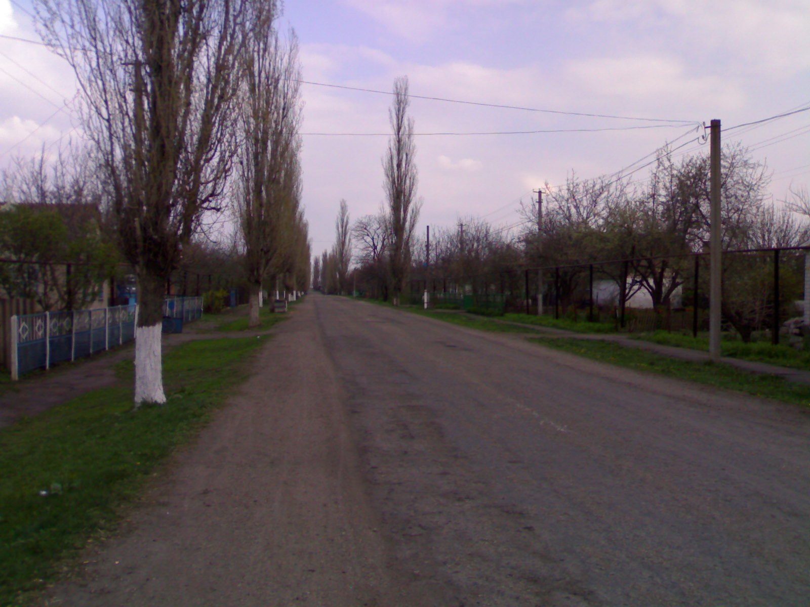 ул. Центальная